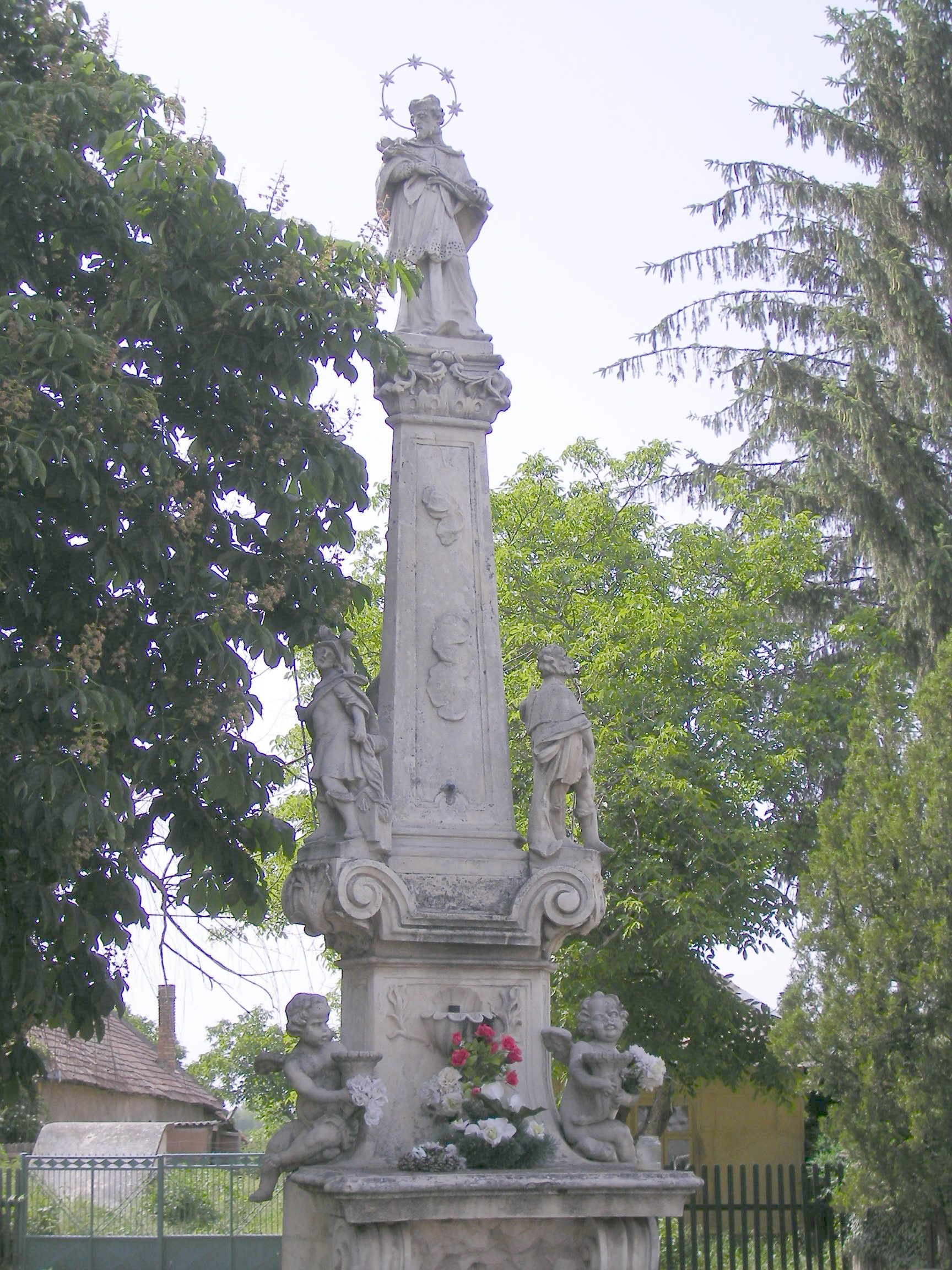 Bagota - Szentháromság-szobor